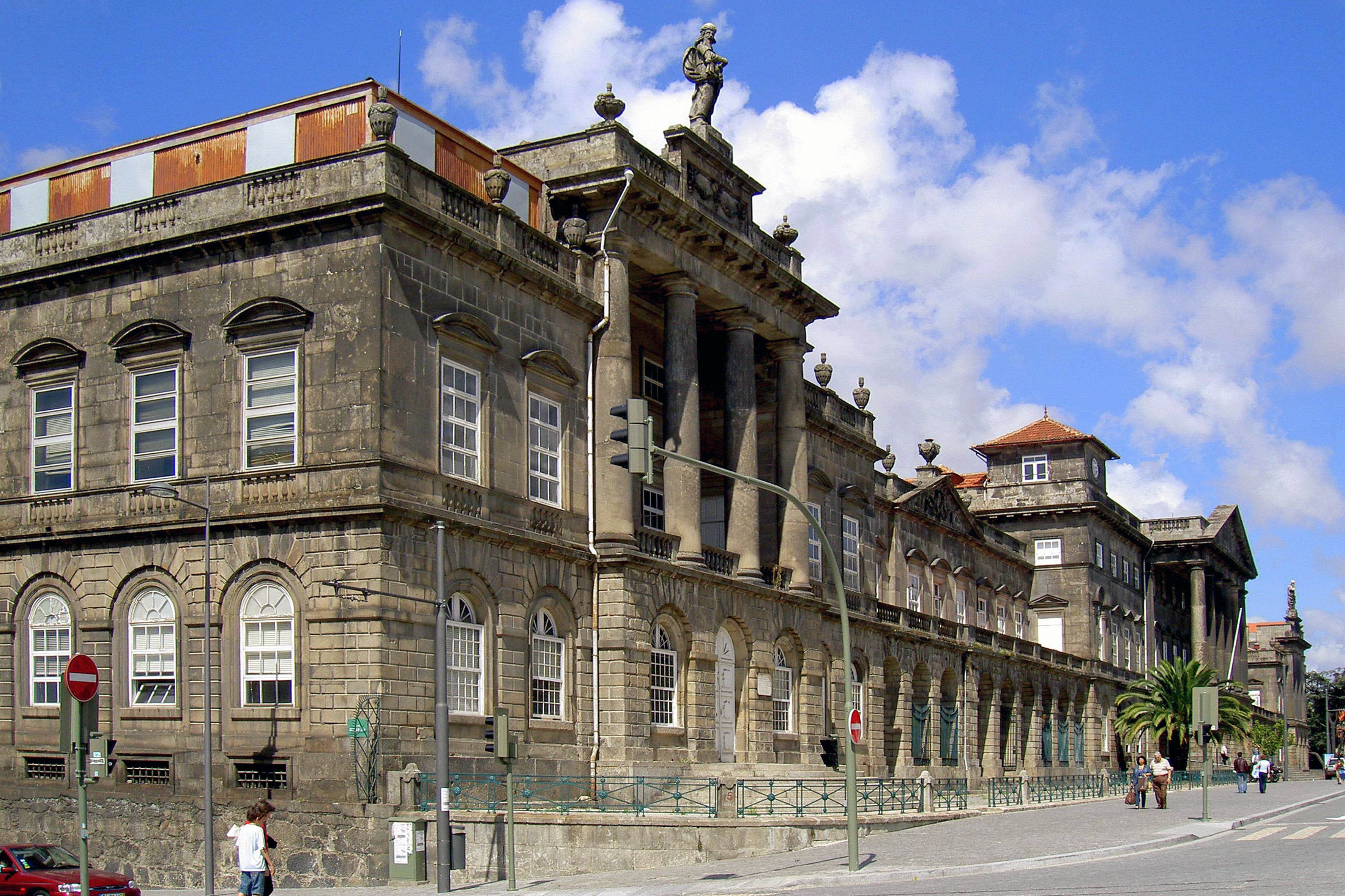 Hospital de Santo António